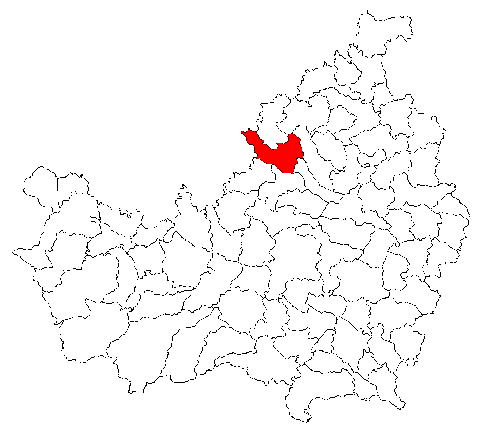 Categorie:Hărţi ale judeţului Cluj